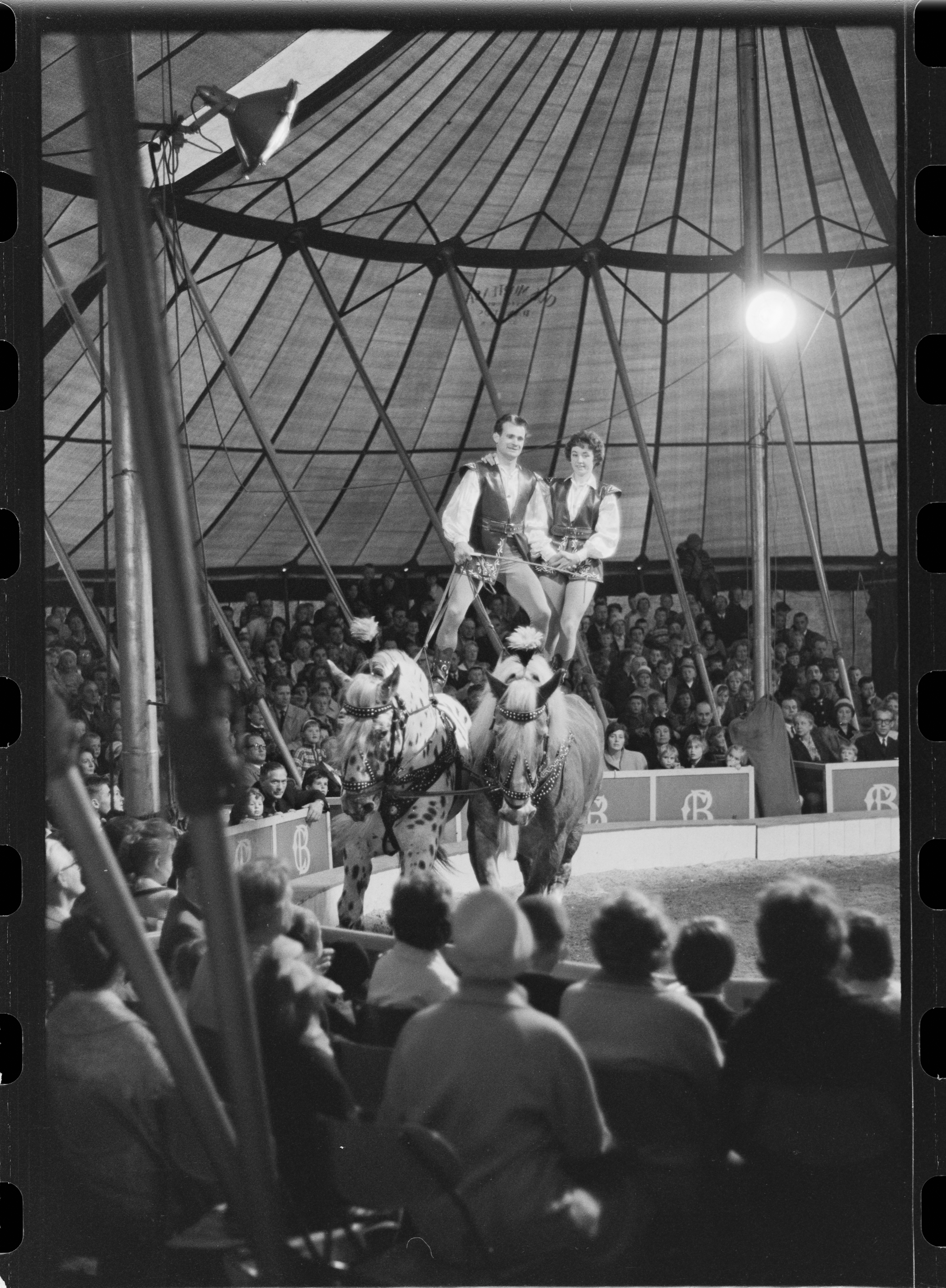 Bildet er hentet fra Arkivverket. Hester og akrobater på cirkus. NÅ nr. 23, 1961 Arkivinstitusjon : Riksarkivet Arkivnavn : Billedbladet NÅ Sted : Norge, Ukjent, Ukjent, Emneord: Underholdning, Cirkus Avbildet